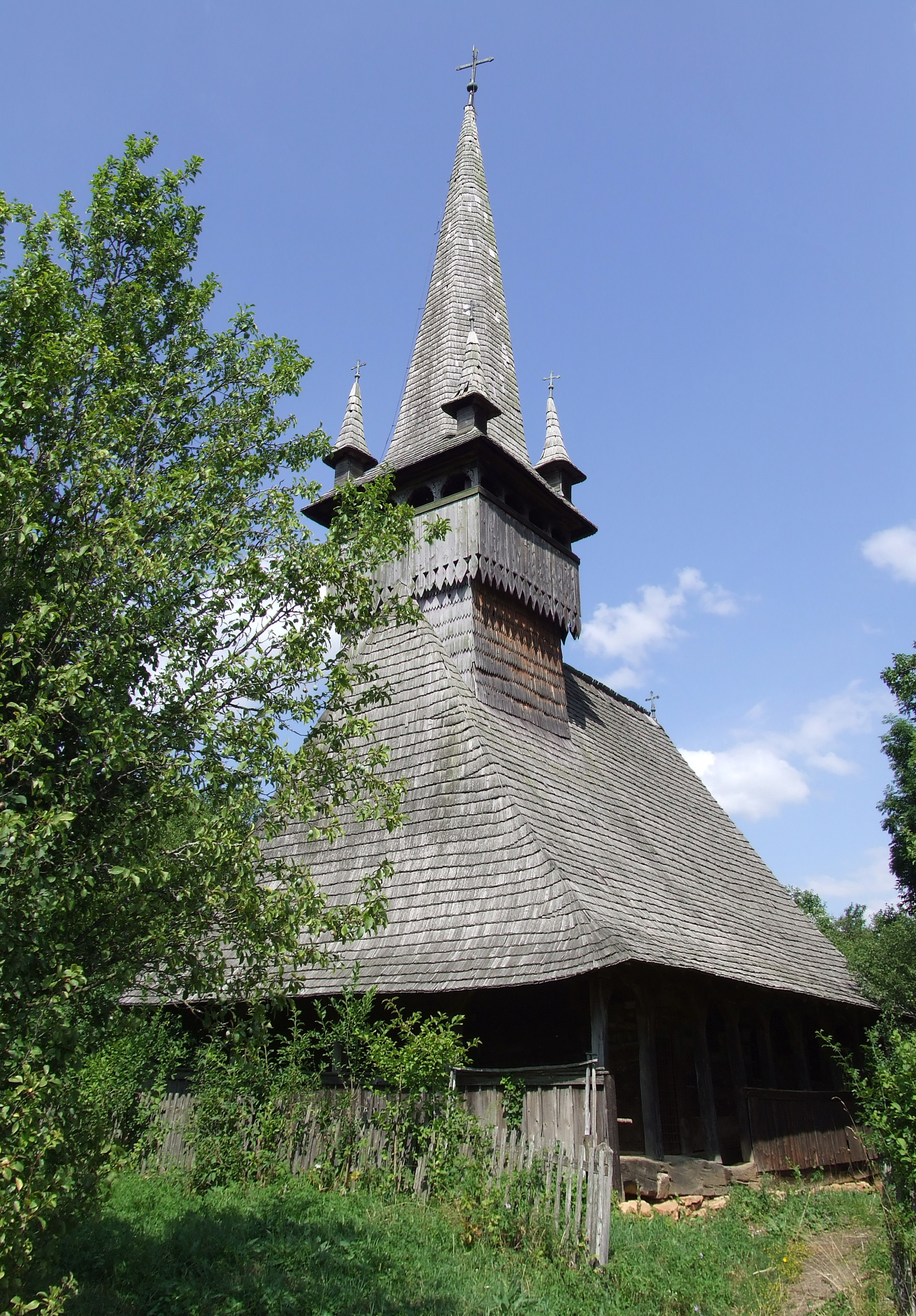 Biserica de lemn din Agârbiciu